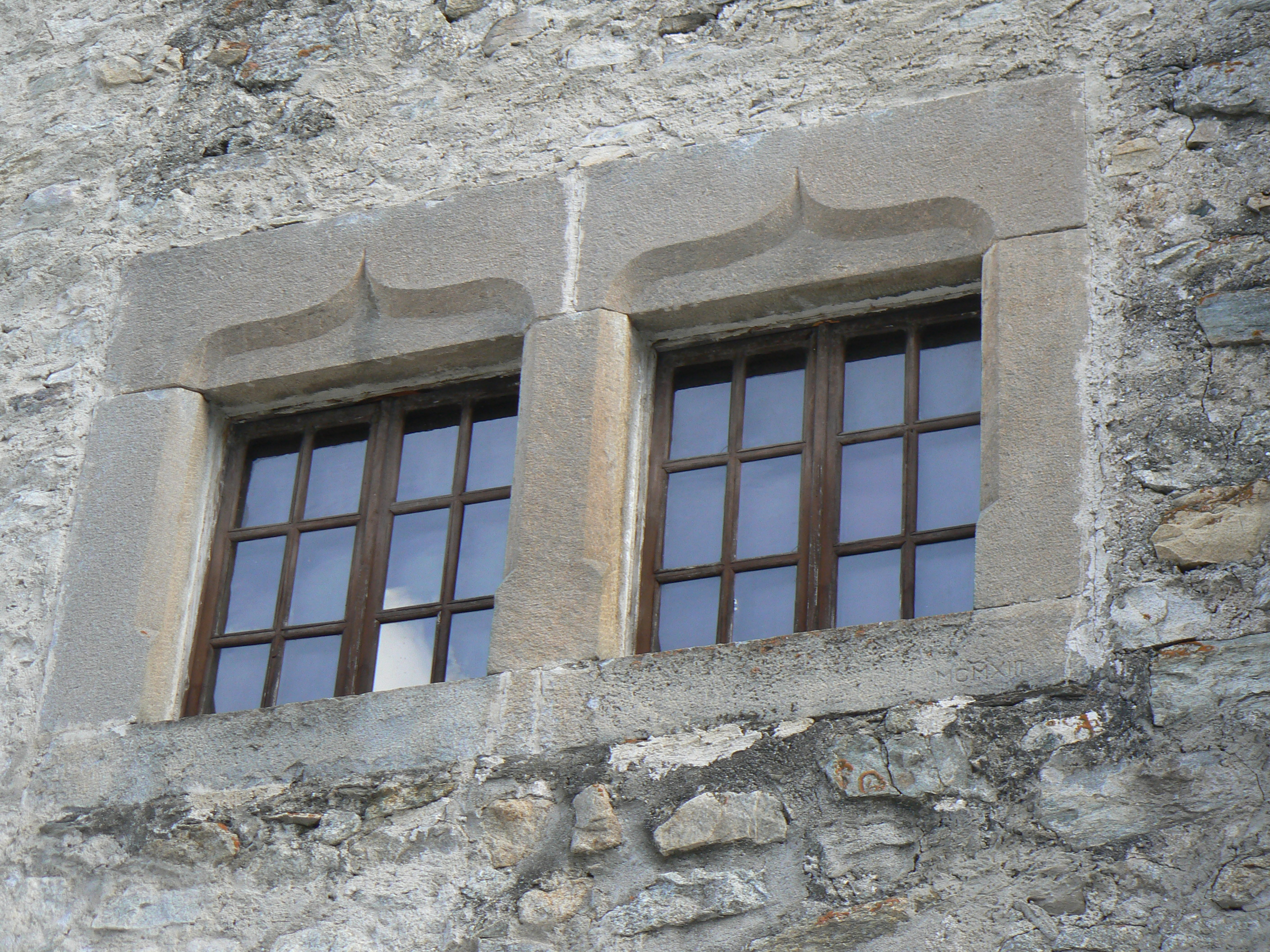 Casaforte Passerin d'Entrèves, Courmayeur, Valle d'Aosta, Italia.